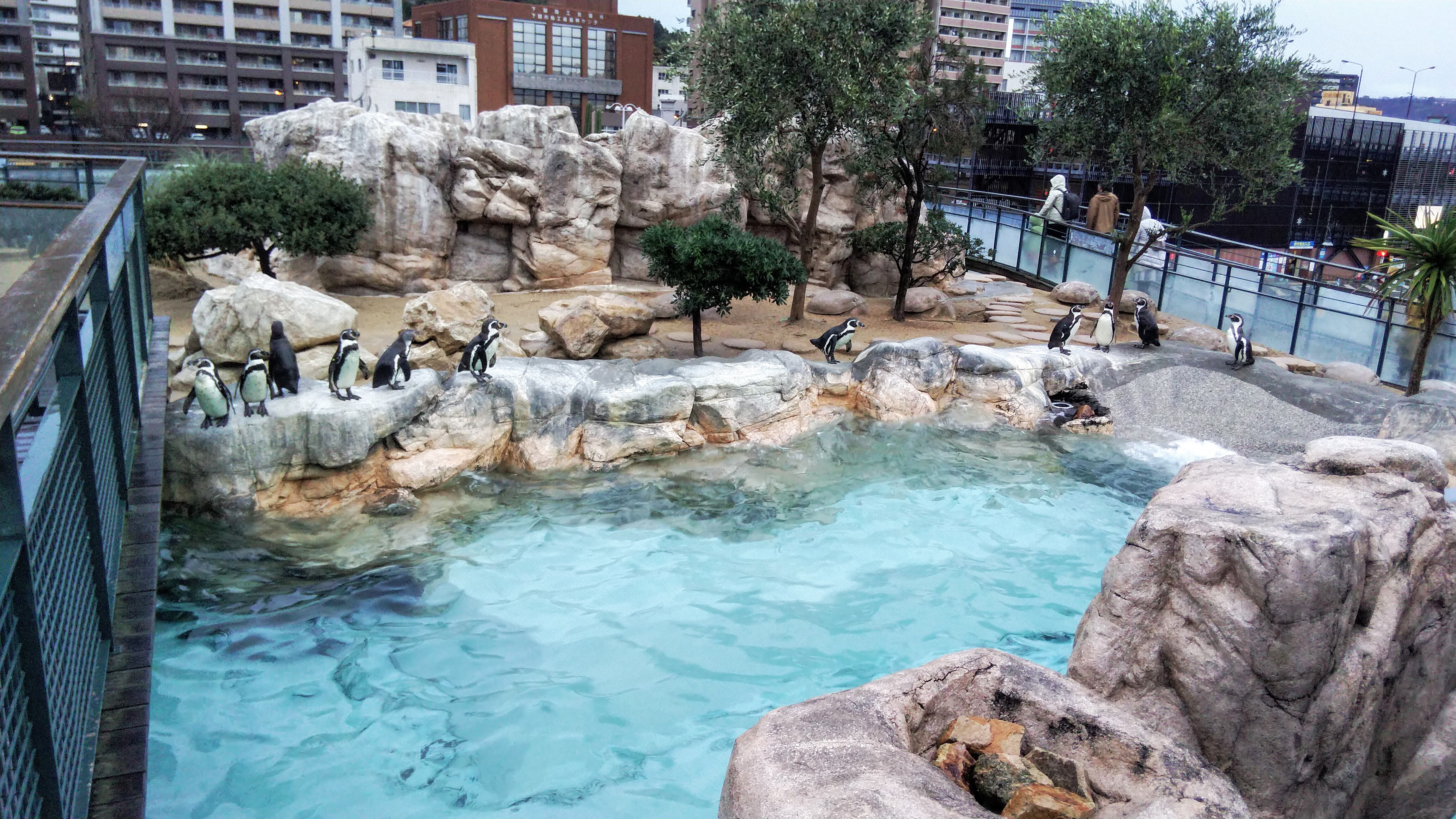 下関市立しものせき水族館（海響館・山口県下関市）の「フンボルトペンギン特別保護区」。重要な生息場所の一つであるアルガロボ島（チリ）を再現している。